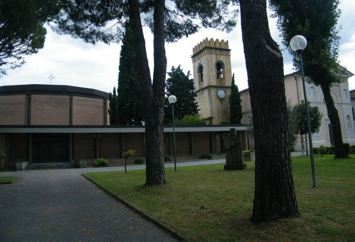 Veduta della Piazza Aldo Moro, in San Niccolò Agliana.